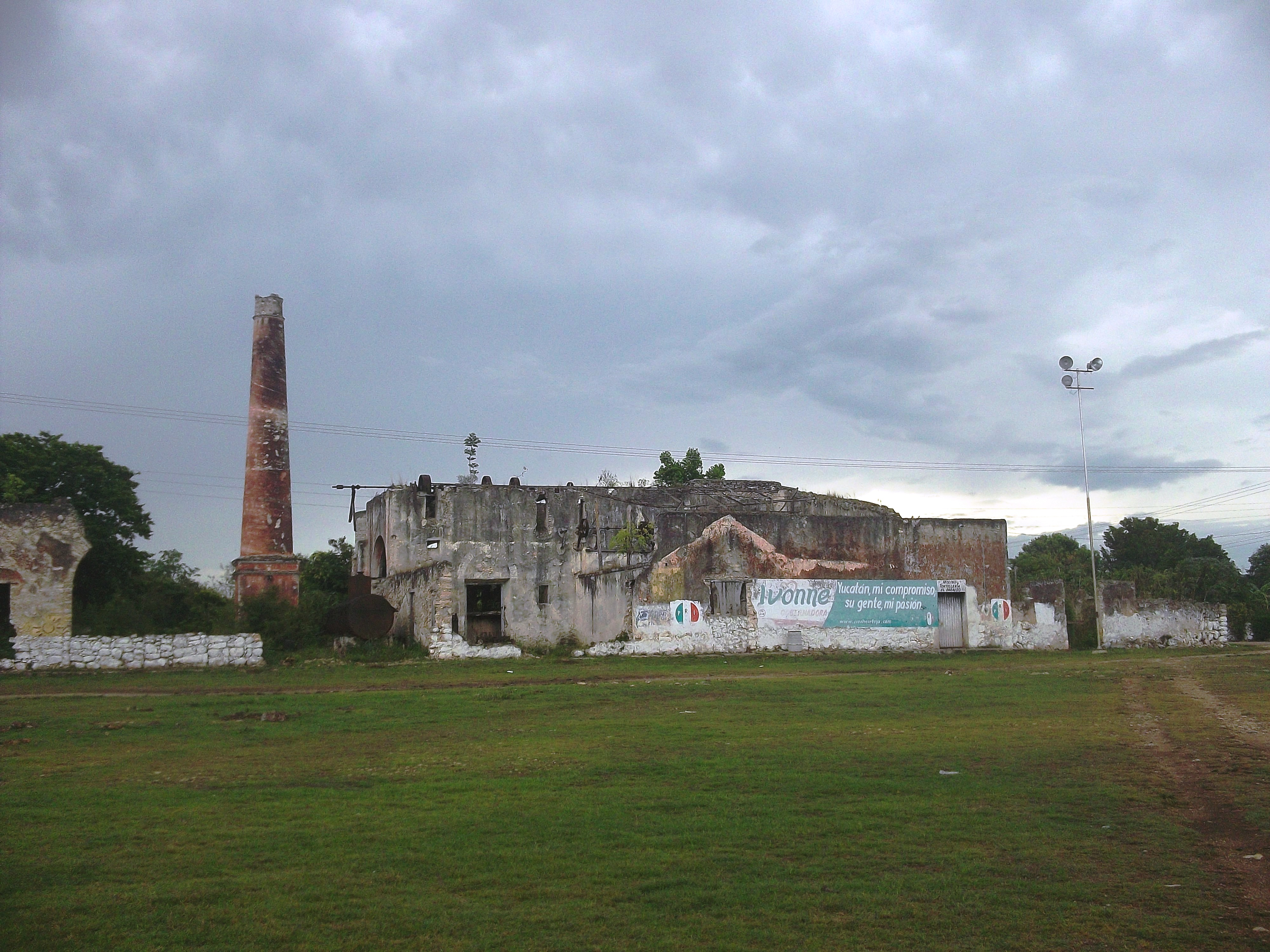 Hacienda de Holactún, Yucatán.